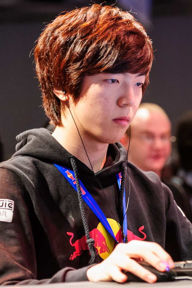 Life au 2013 MLG Winter Championship